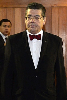 Luis Riveros, exrector de la Universidad de Chile.